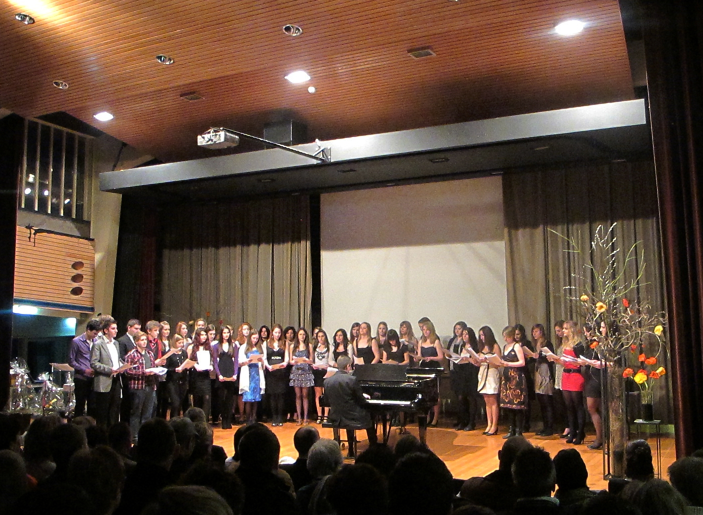 Chor in der Aula Kantonsschule Solothurn Abschlussfeier FMS plus